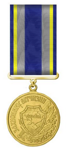 Медаль «Захиснику Вітчизни» (з 2015)